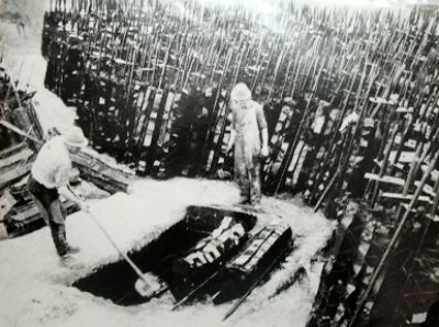 Imaginea reprezintă lucrarea Judecata de Apoi (f.a., anii șaptezeci), a fotografului român Aurel Mihailopol. Dimensiunile fotografiei sunt 28x38 cm.